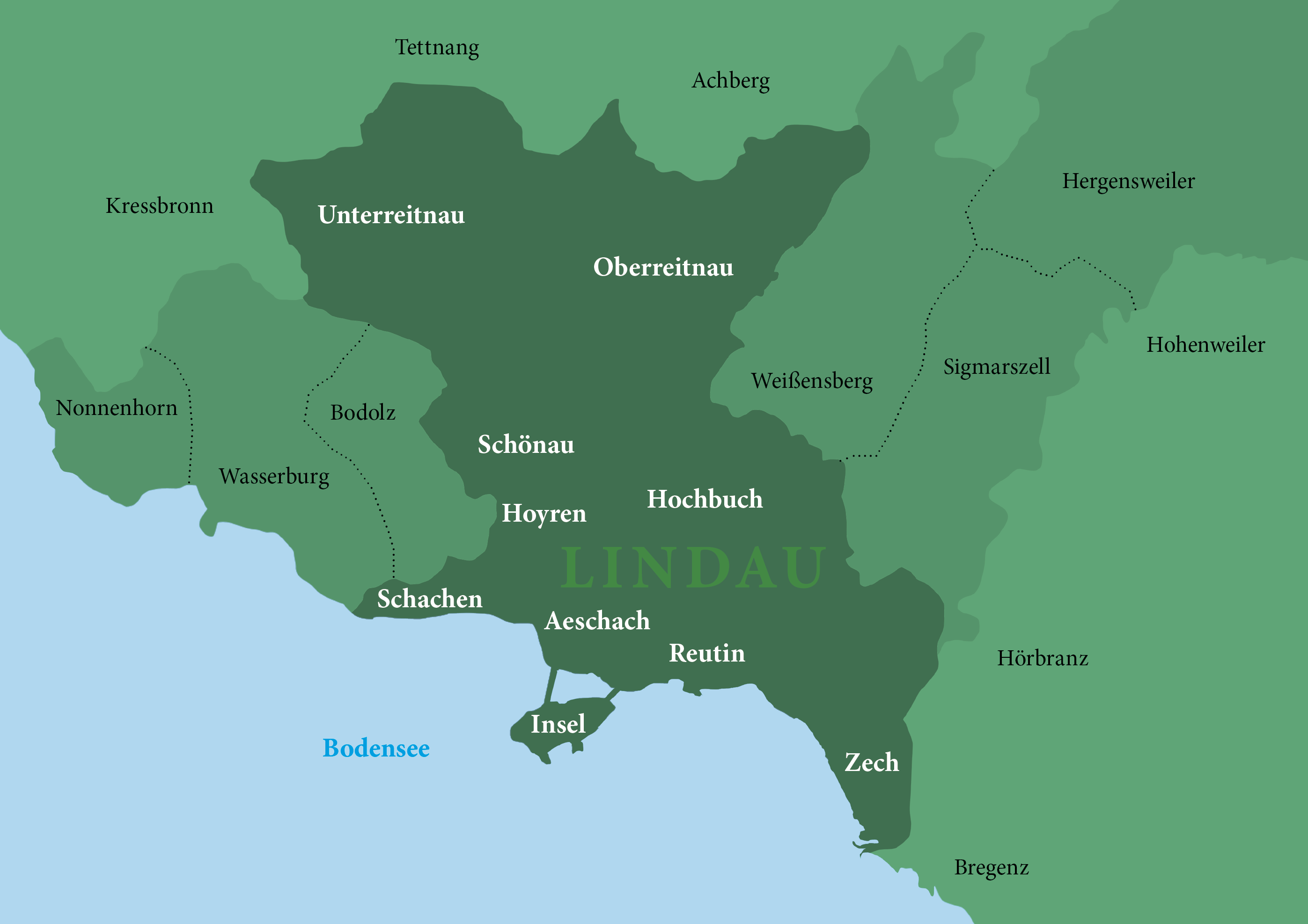 Lindau am Bodensee, Stadtteile und Nachbargemeinden